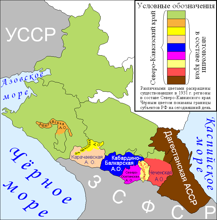 Северо-Кавказский край (1931)